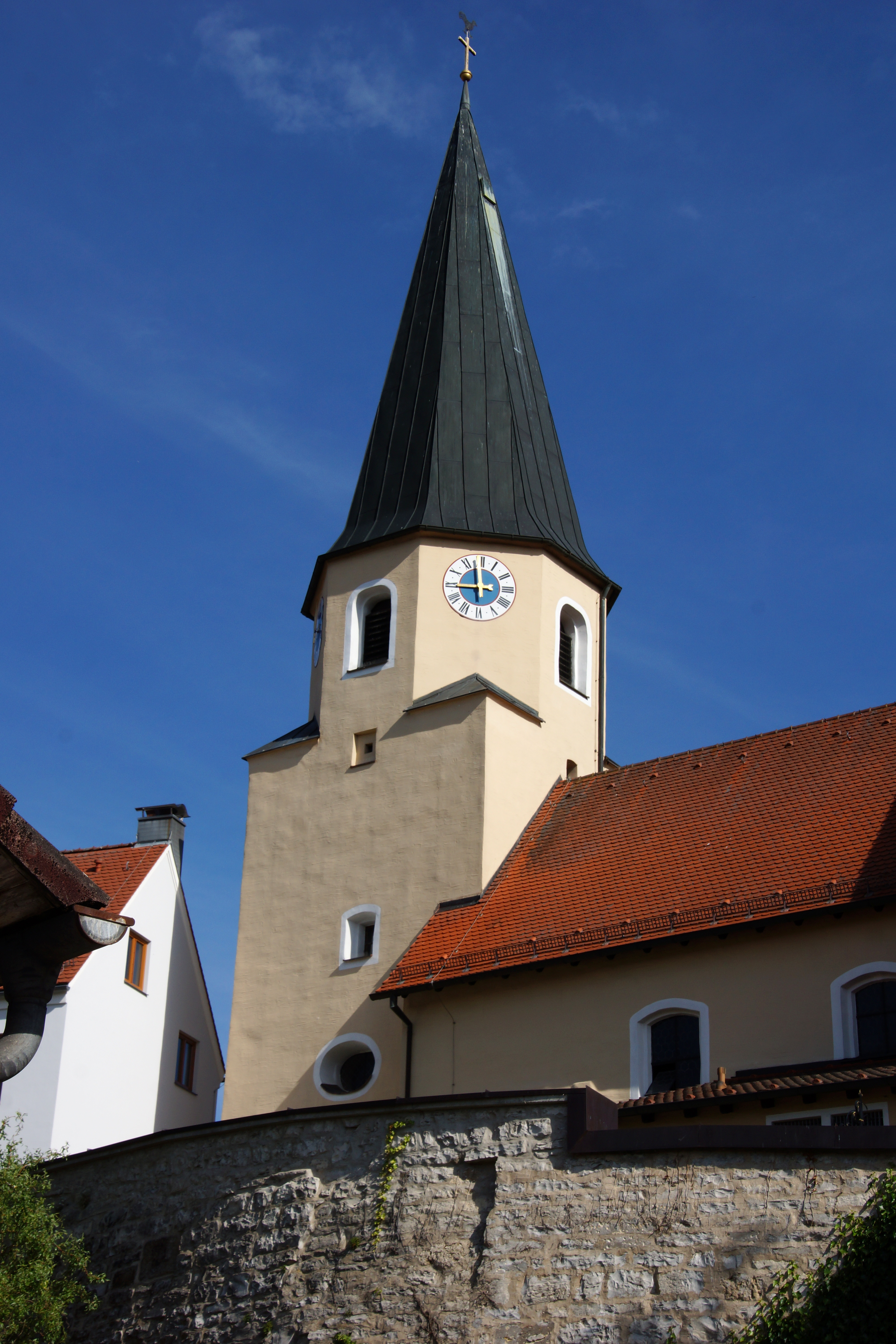 Die katholische Expositurkirche St. Johannes Evangelist in Laaber, Gemeinde Pilsach, Kreis Neumarkt